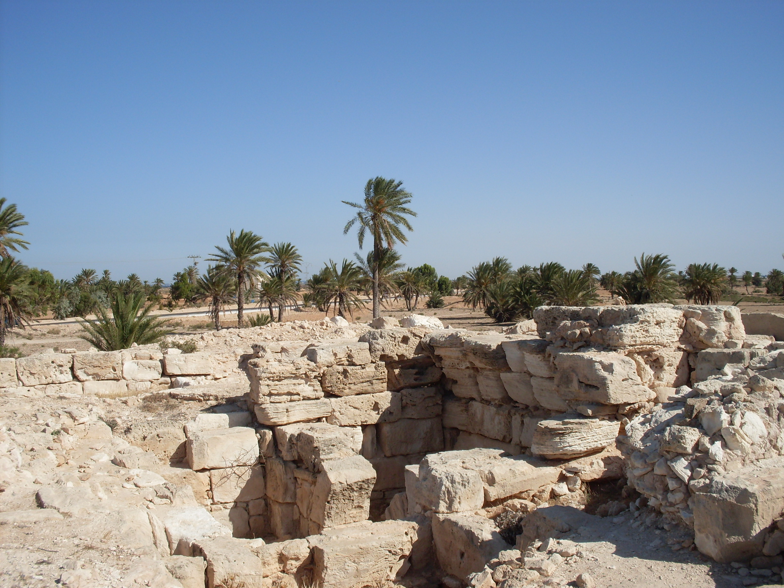 Temple Romain Tala route d'El Kantara